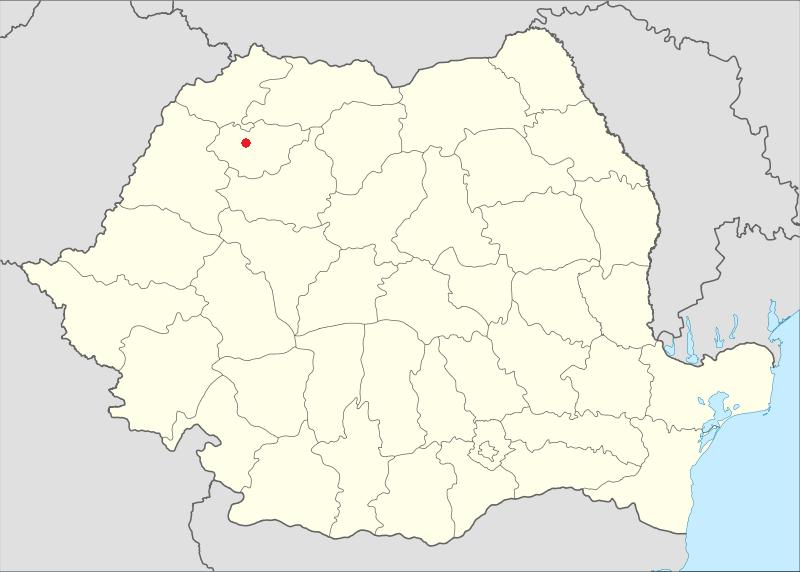 Giurtelecu Şimleului in Romania